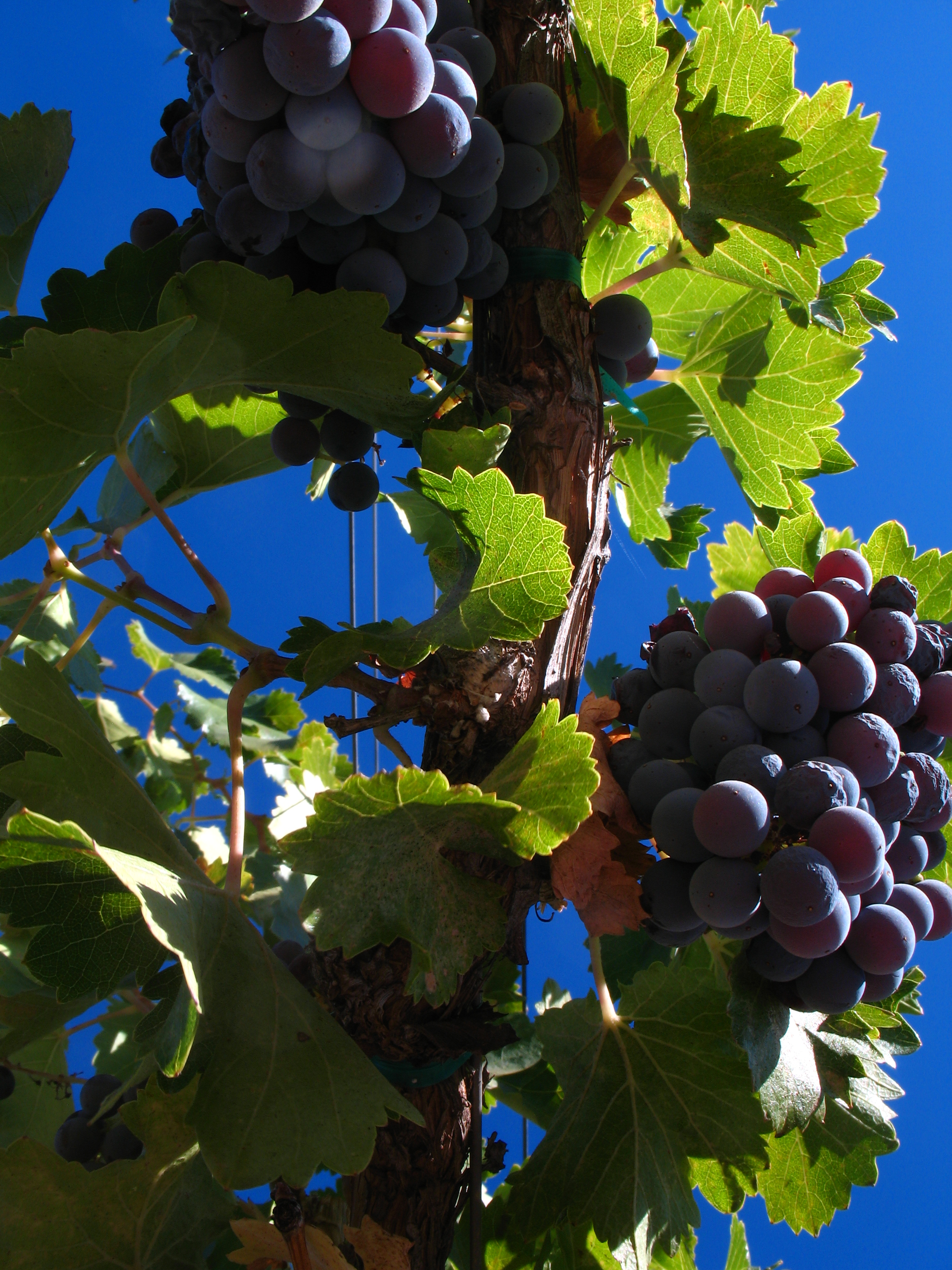 Grenache grapes from Santa Barbara California